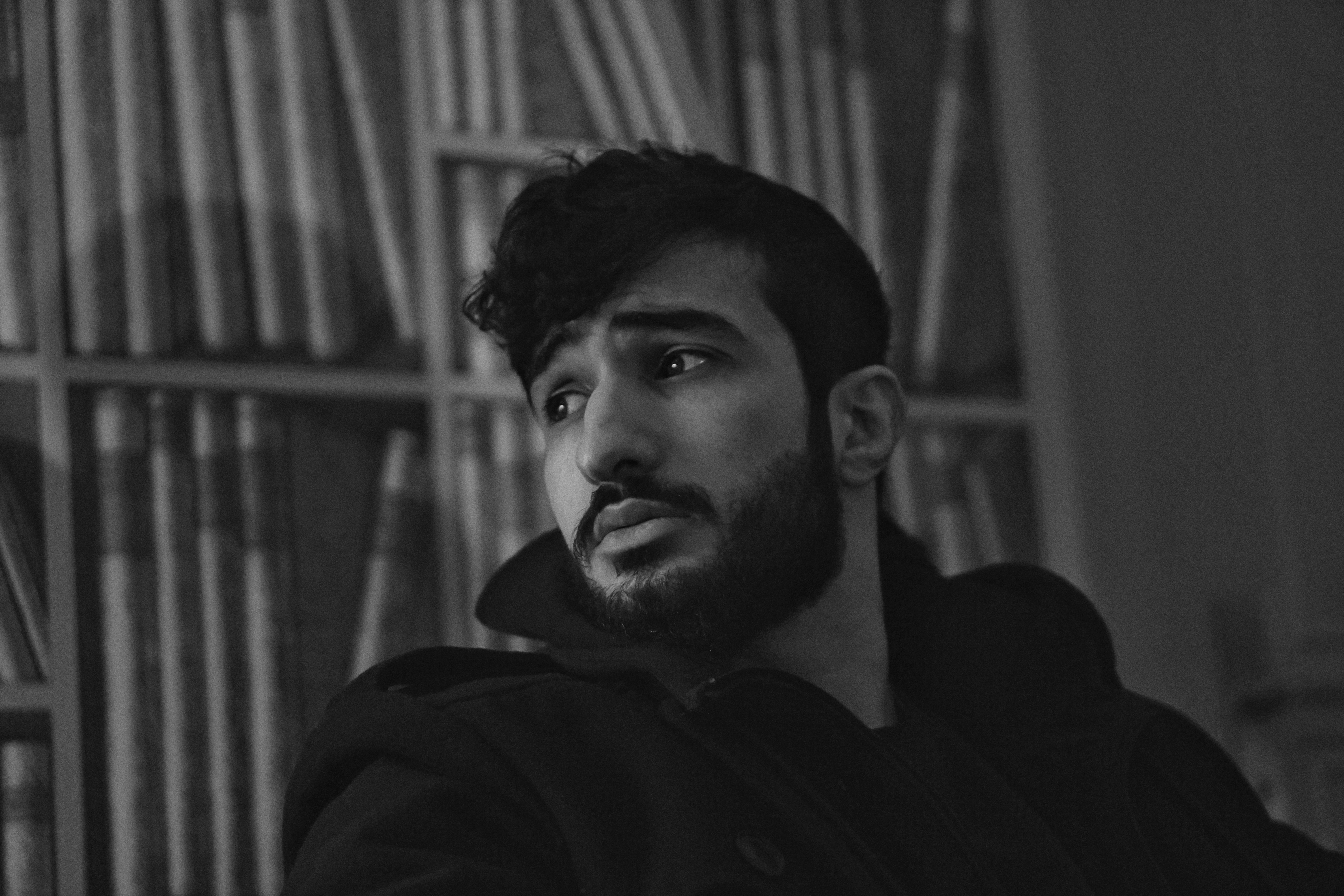 Mohamed Chahrour im Hotel de Rome (Berlin)